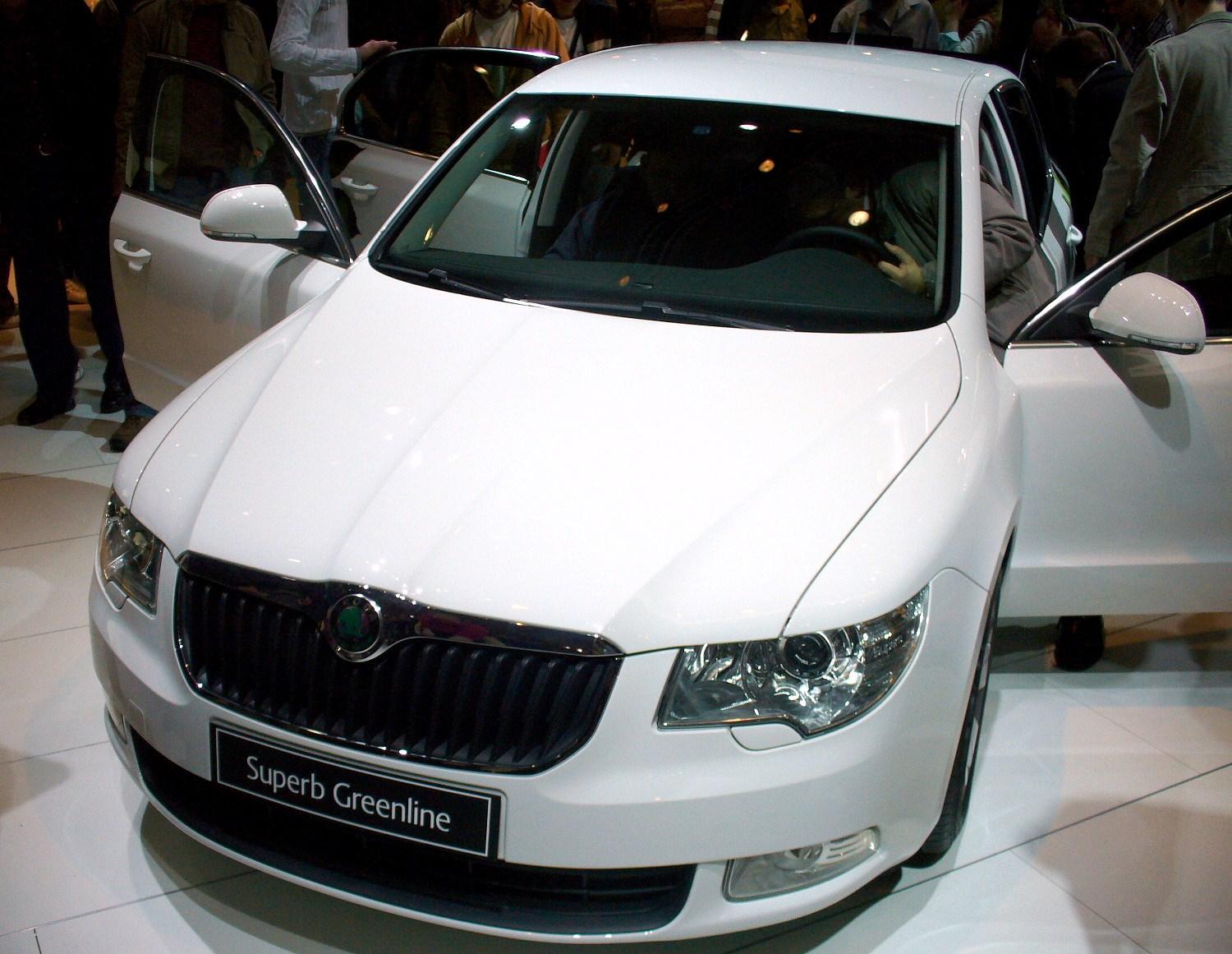 Škoda Superb Greenline